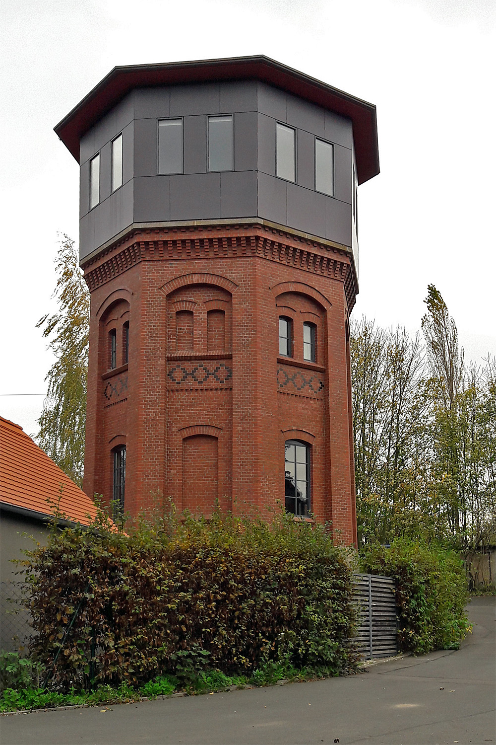 Wasserturm am Bahnhof Eilenburg